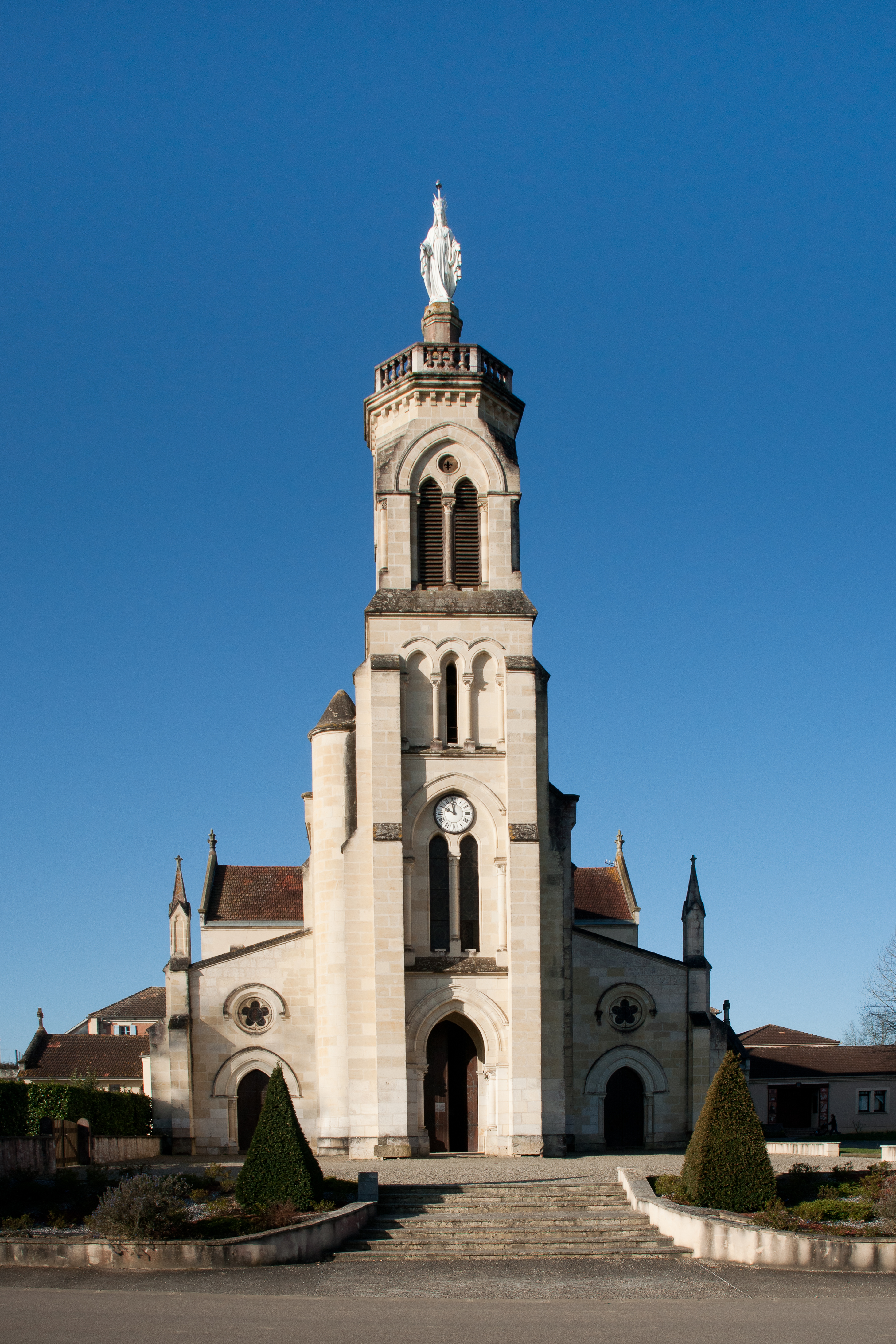 Abbaye Notre-Dame de Maylis